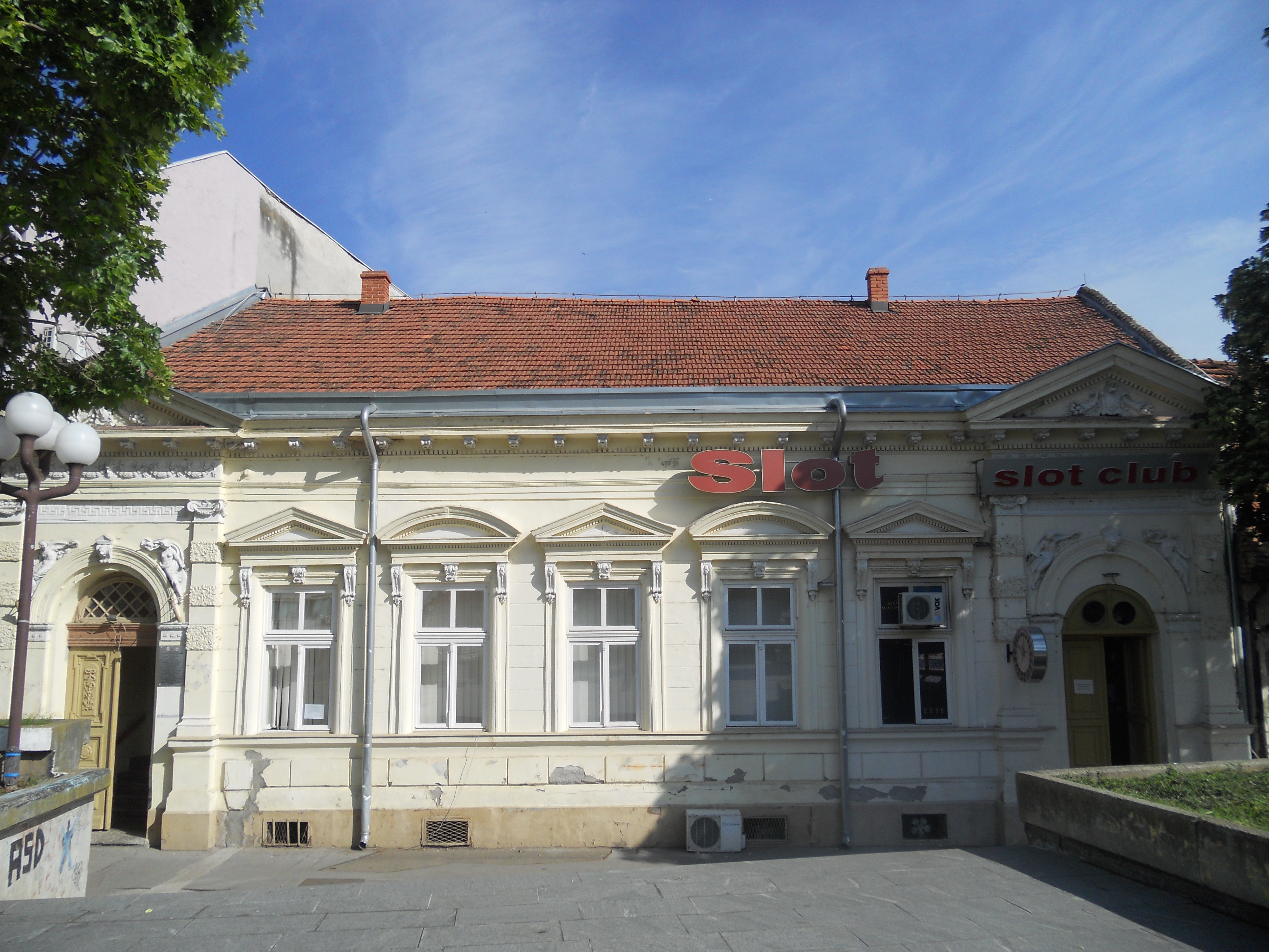 Staro jezgro Zrenjanina